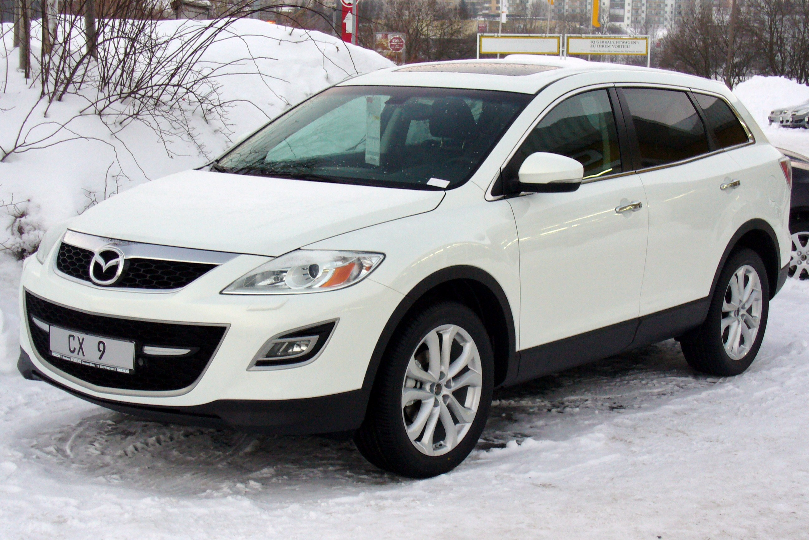 Mazda CX-9